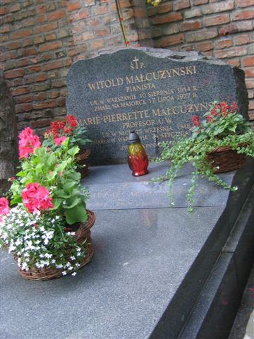 Witold Małcużyński's monument (Powązki Cemetery)